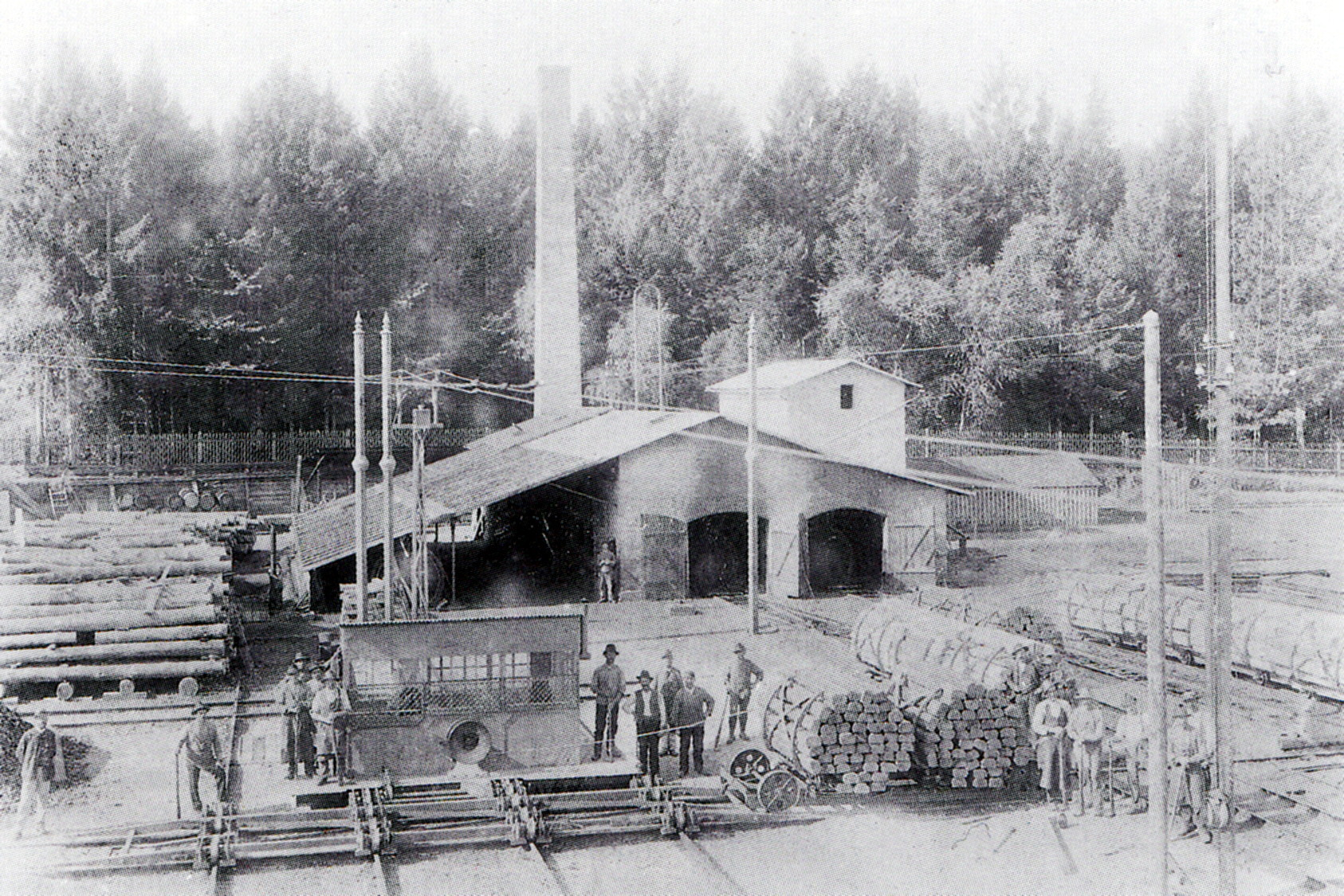 Alte Kyanisierhalle von 1869 bis 1910 im Schwellenwerk Kirchseeon. Im Hintergrund ist die heute abschnittsweise noch existente Zaunabgrenzung an den süd- und südwestlich anschließenden Tauben- u. Dachsbergwald zu erkennen. Topographische Karte (Messtischblatt) 1: 25.000 um 1910 mit Darstellung des Waldbahngleises und Gelände des Schwellenwerks in Kirchseeon auf BayernAtlas.de